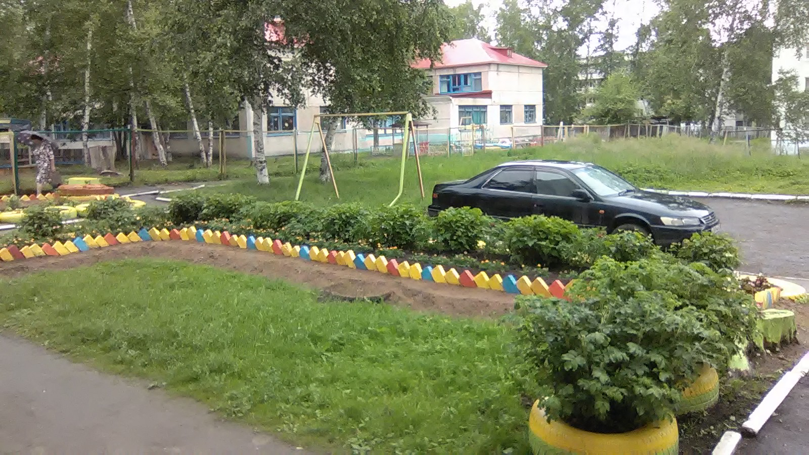 Детский сад